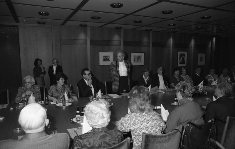 Bonn, 26. April 1989 Die Parlamentarische Staatssekretärin beim Bundeskanzler und Bevollmächtigte der Bundesregierung in Berlin, Lieselotte Berger (Mitte), empfing im Bundeskanzleramt 15 Berliner Behinderte. Seit 15 Jahren werden Berliner Behinderte, unter ihnen Rollstuhlfahrer, Blinde, Gehörlose und andere Schwerbehinderte mit ihren Betreuungspersonen von Berliner Abgeordneten nach Bonn eingeladen.